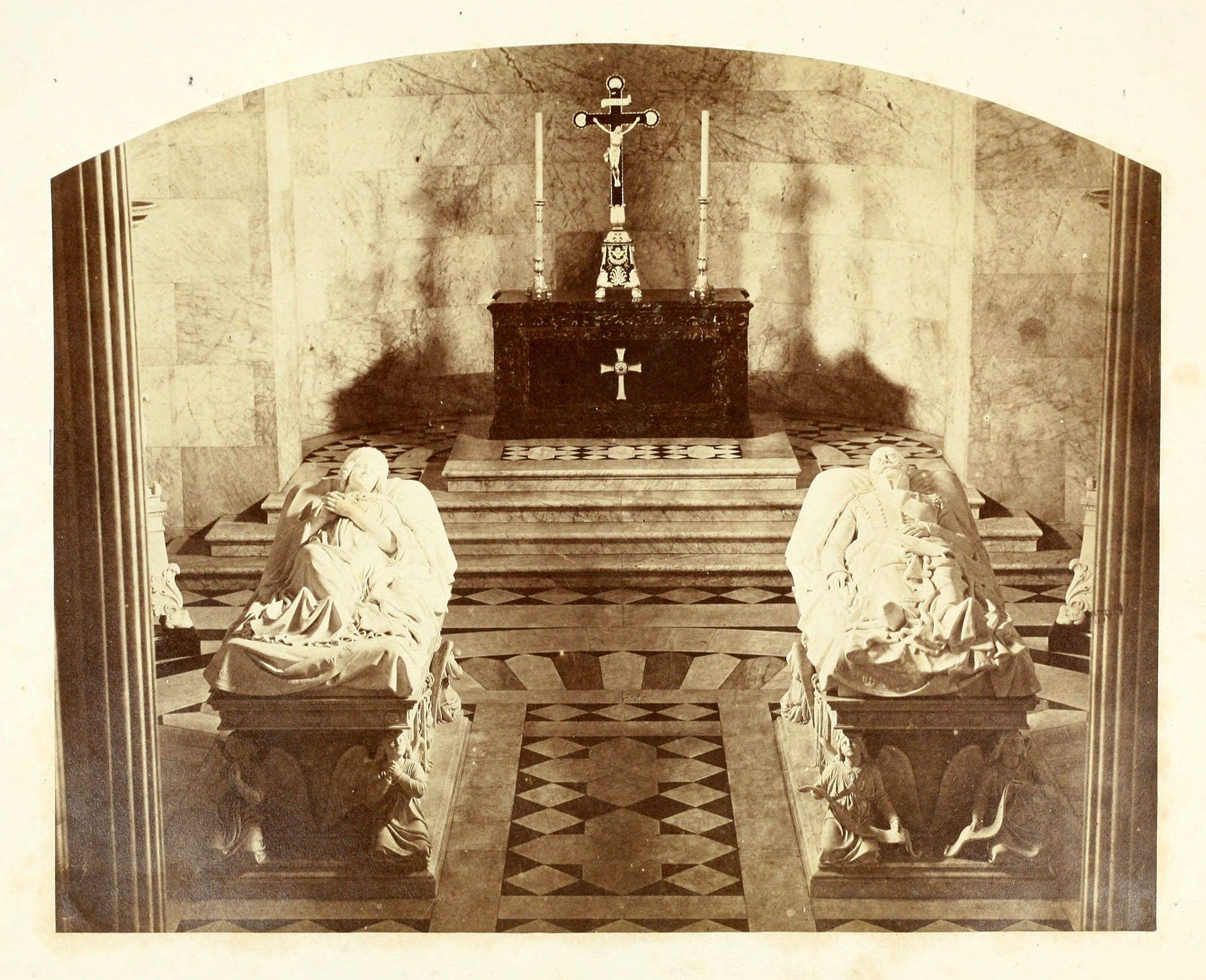 Seite aus dem Ernst August Album ...